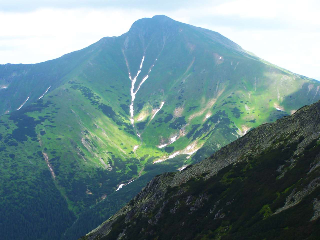 Kamienista (Tatra Mountains)